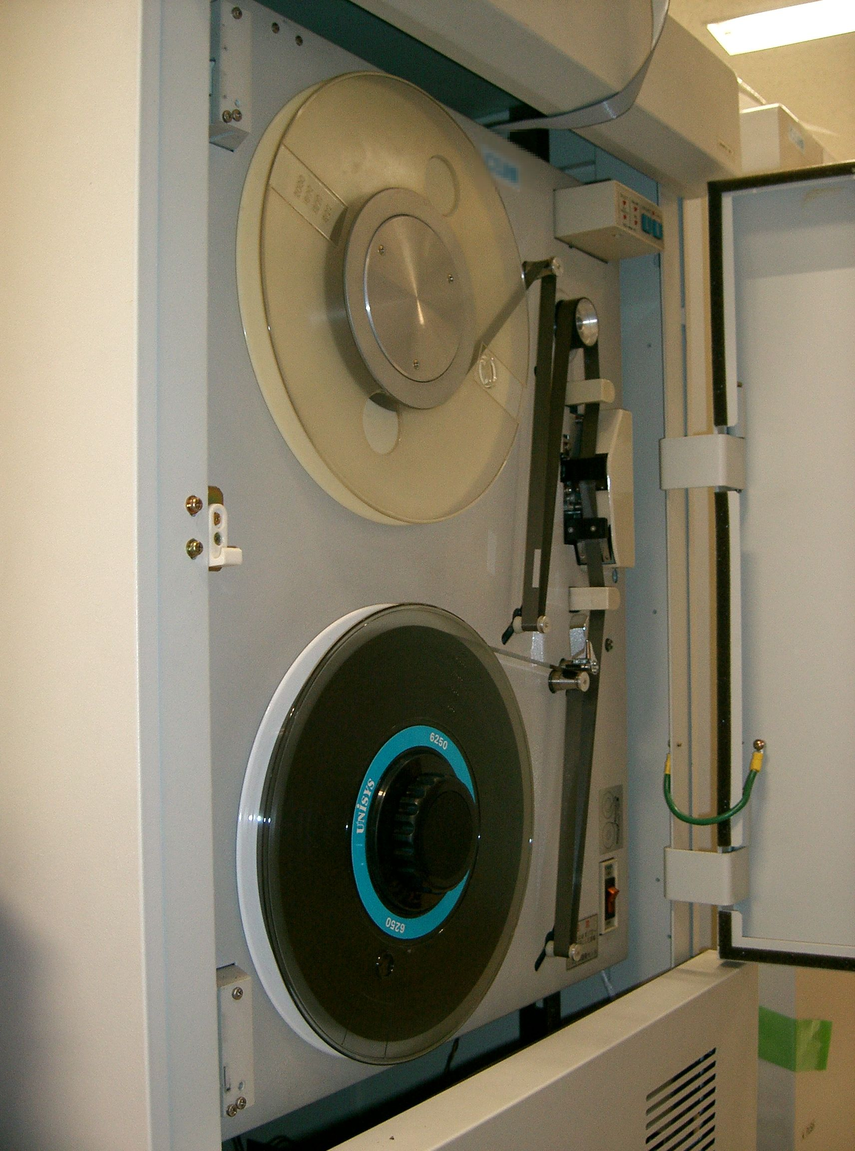 magnetic tape unit